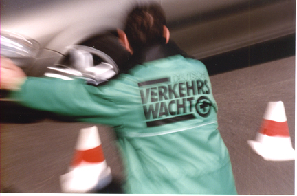 Verkehrswachtmann mit Jacke